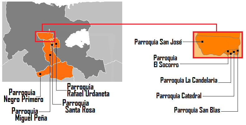 Parroquias de Valencia, Venezuela (2004)